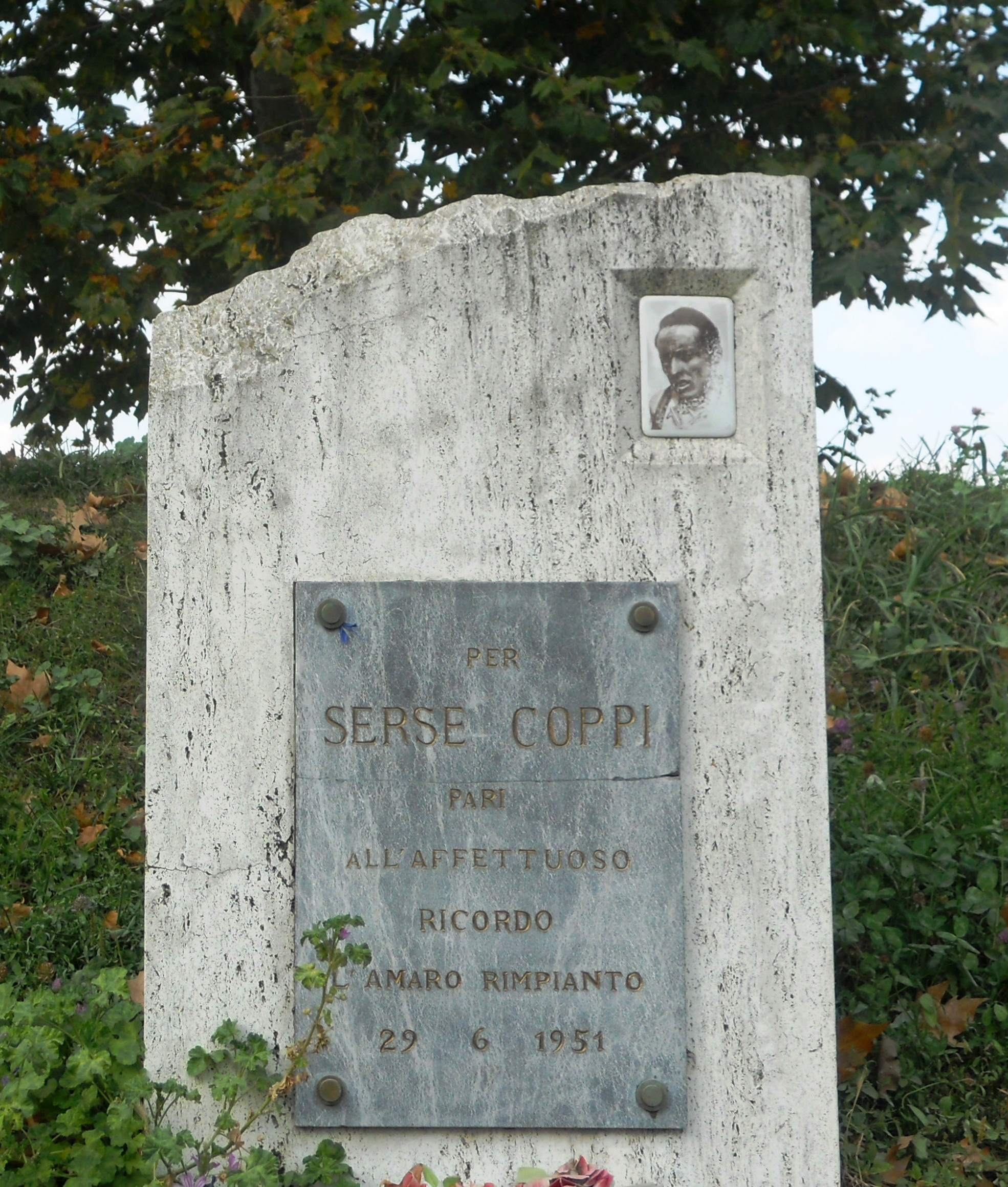 Lapide dedicata a Serse Coppi, davanti al Motovelodromo di Torino